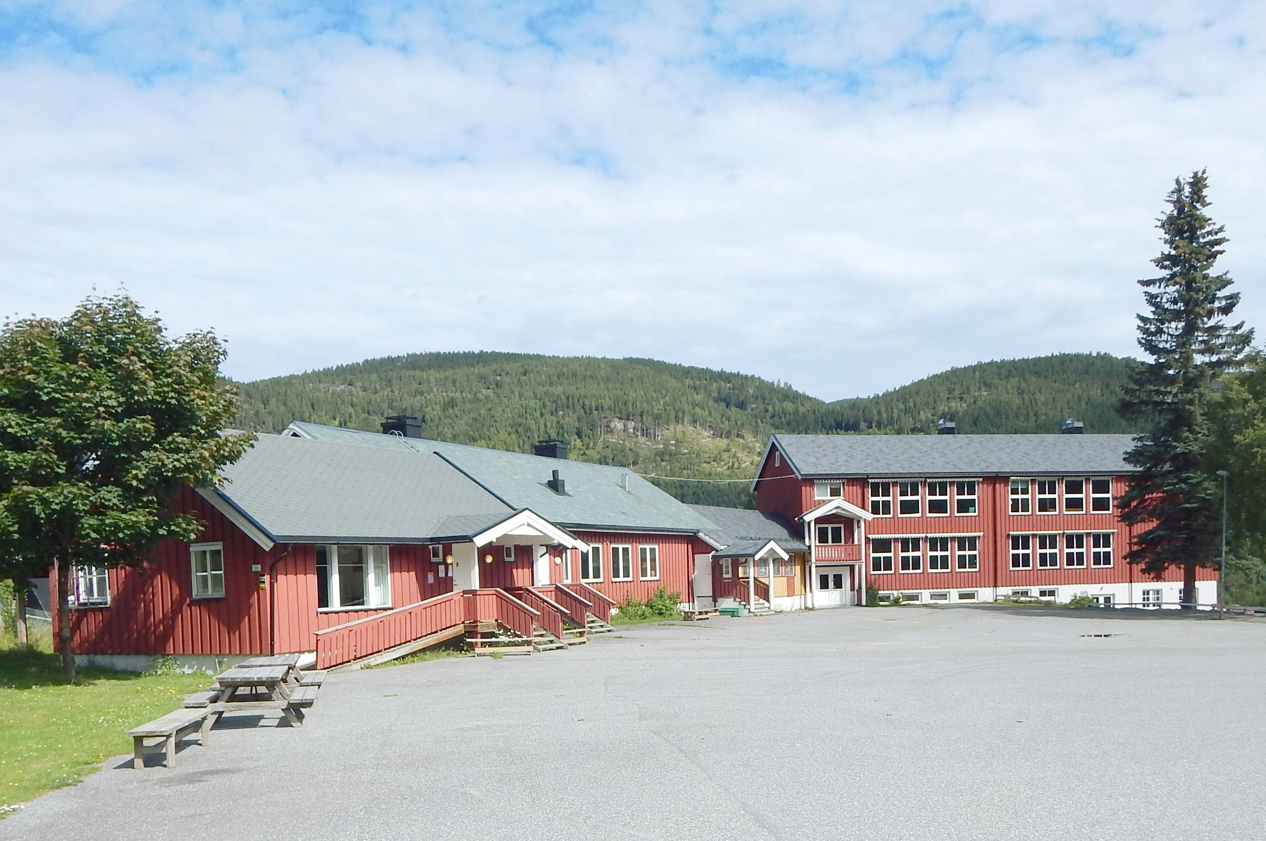 Begnadalen skole på Tollefsrud